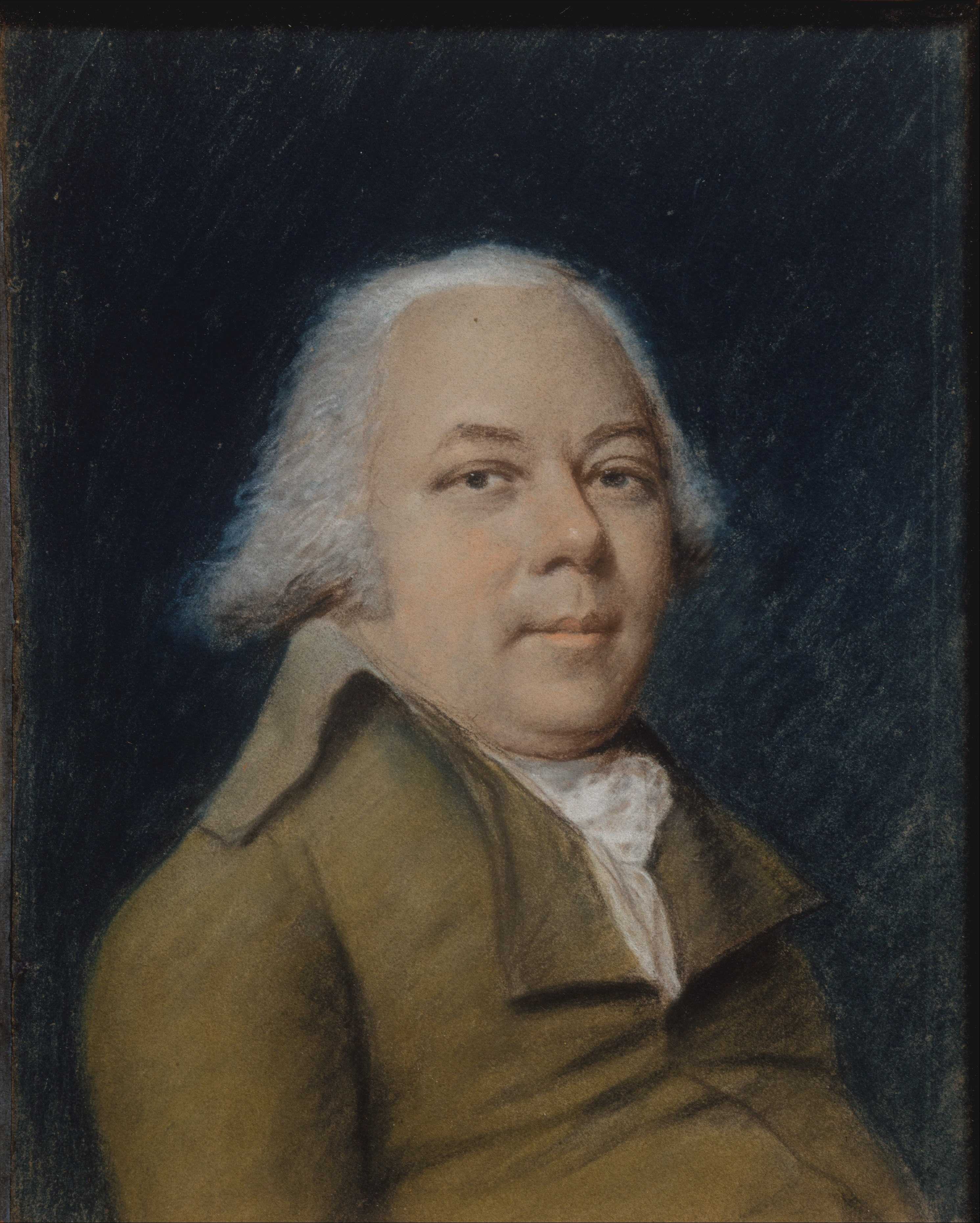 Drawing; Drawings